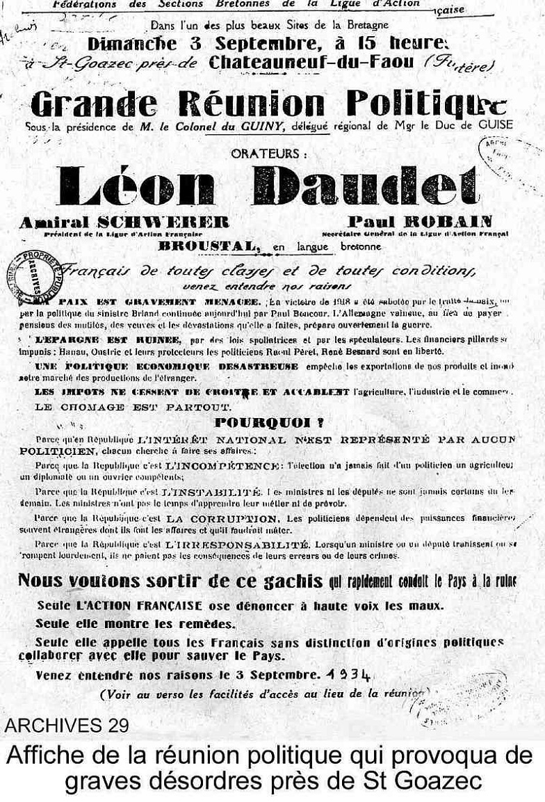 Saiont-Goazec : Affiche politique concernant une réunion organisée par l'Action française au château de Kervoazec en 1934 (Archives du Finistère)